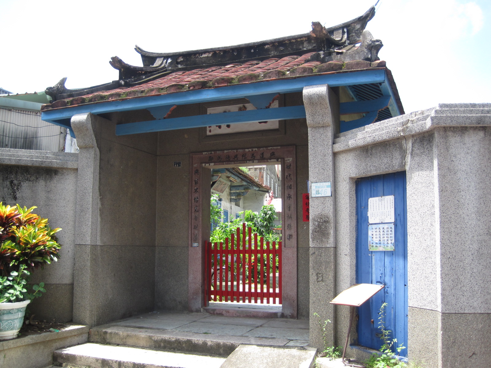 臺南陳世興古厝